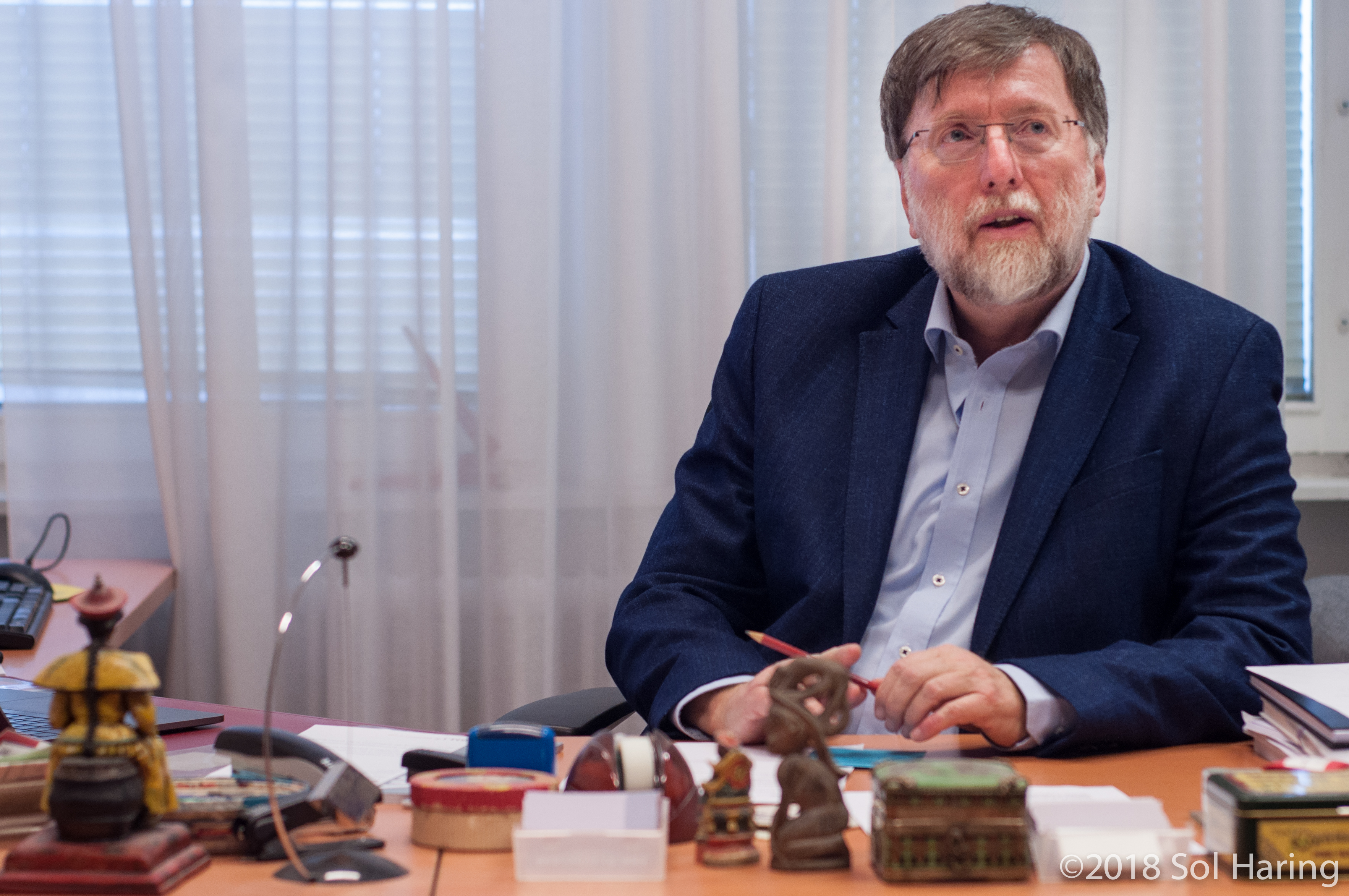 Franz Kolland 2018 (Foto: Sol Haring)